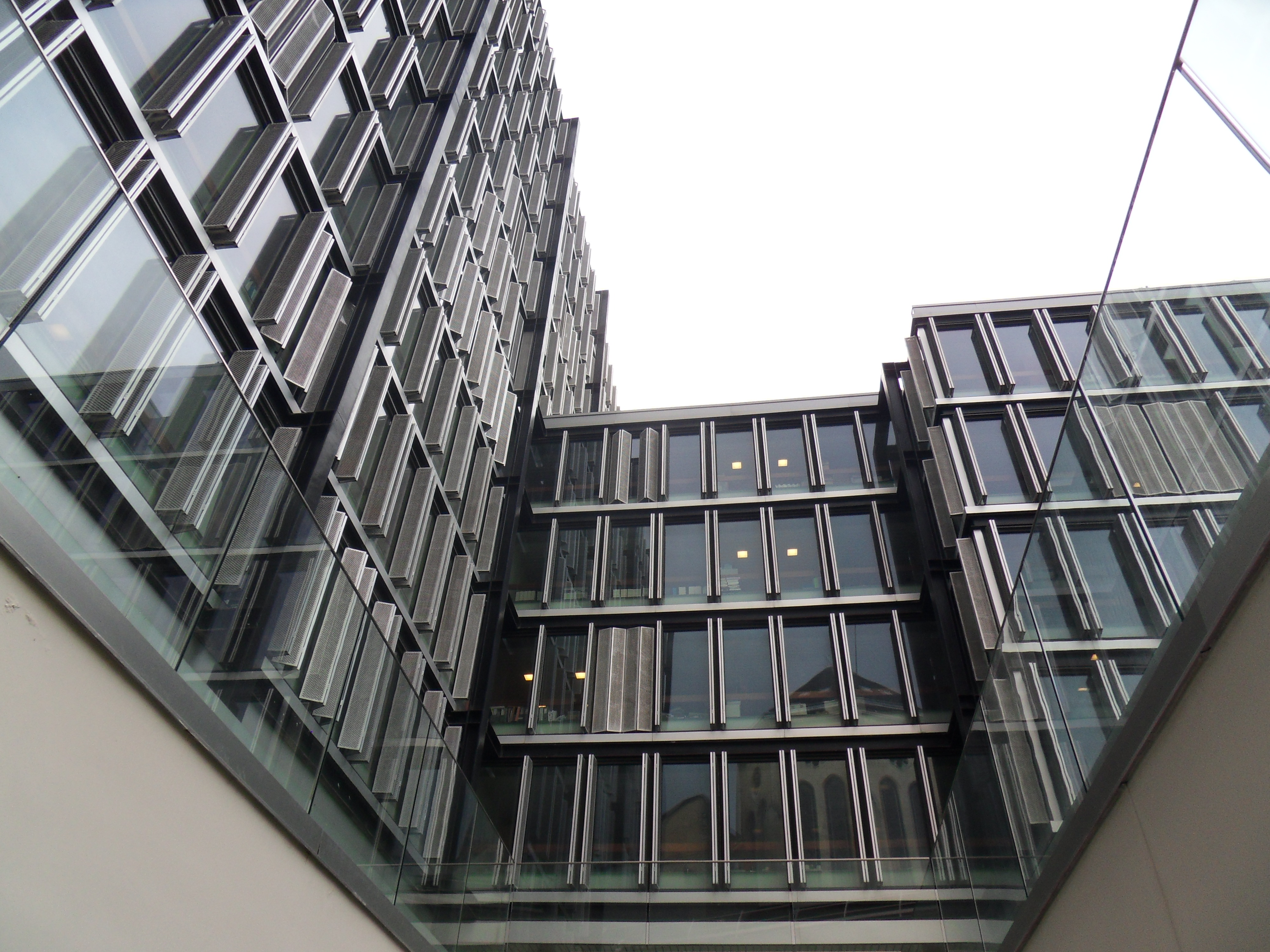 Edificio de la EHESS en Boulevard Raspail